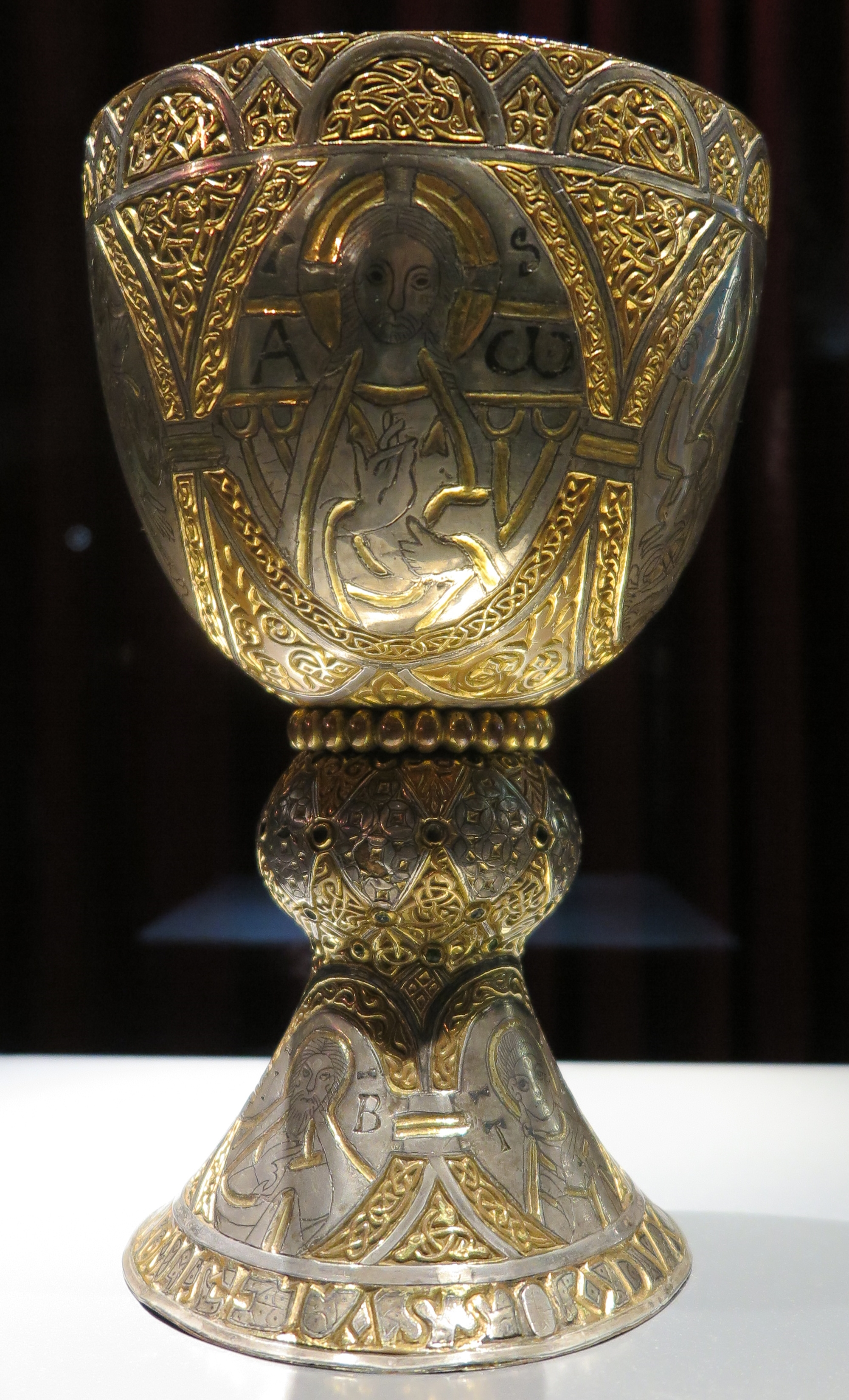 Tassilokelch im Centre Charlemagne in Aachen während der Ausstellung „Karl der Große - Macht, Kunst, Schätze“.